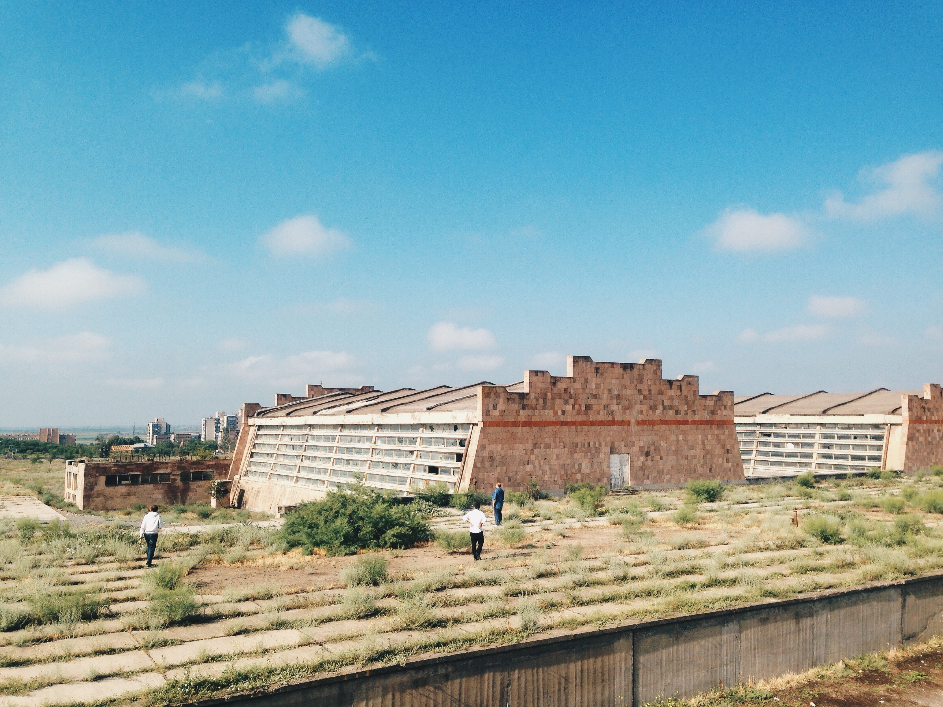 Sport complex with 2 sports hall and a swimming pool. Construction duration 1975-1986.